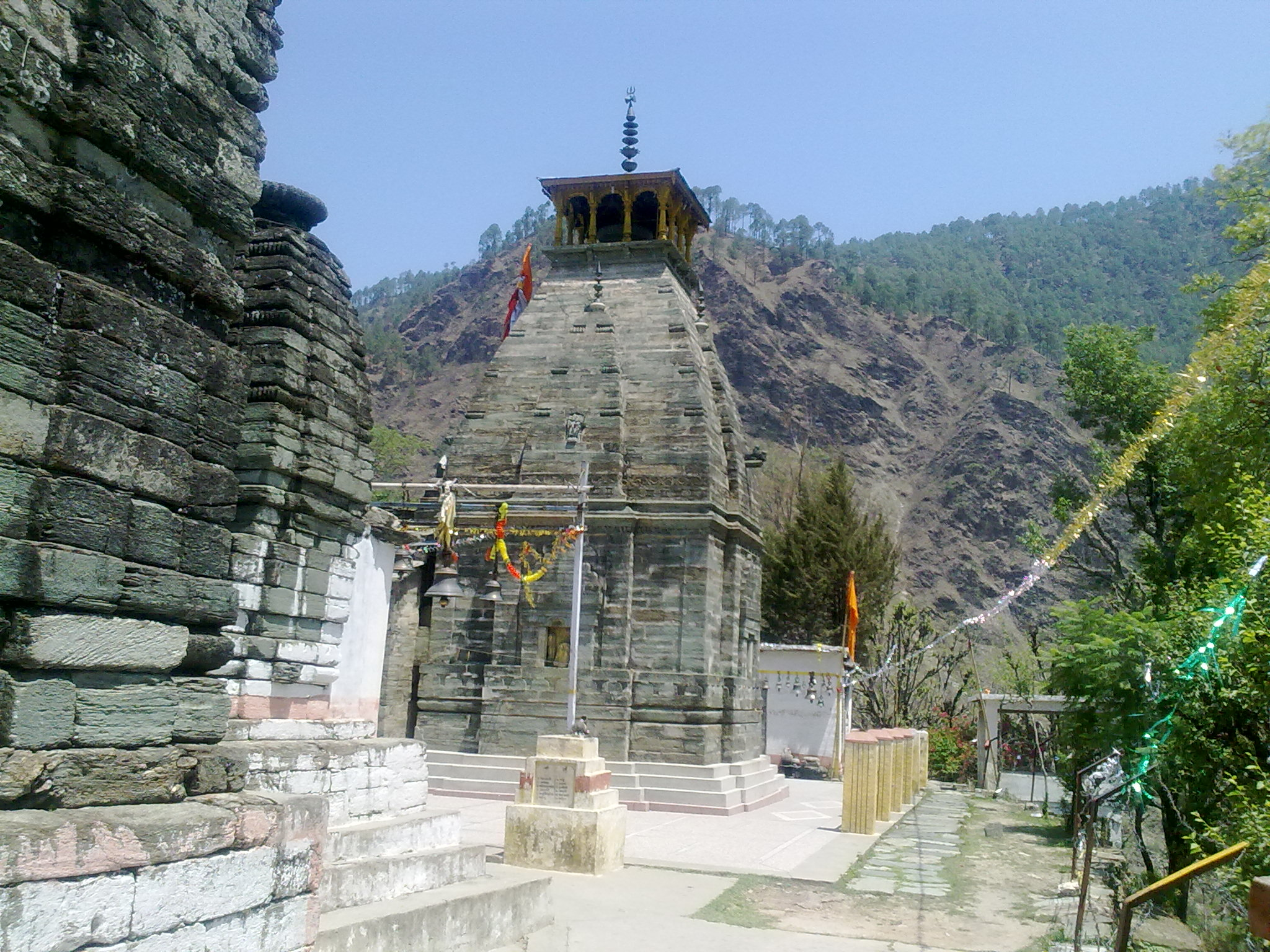 उत्तराखण्ड के रुद्रप्रयाग जिले के फलासी नामक गाँव में स्थित तुंगनाथ मन्दिर।)